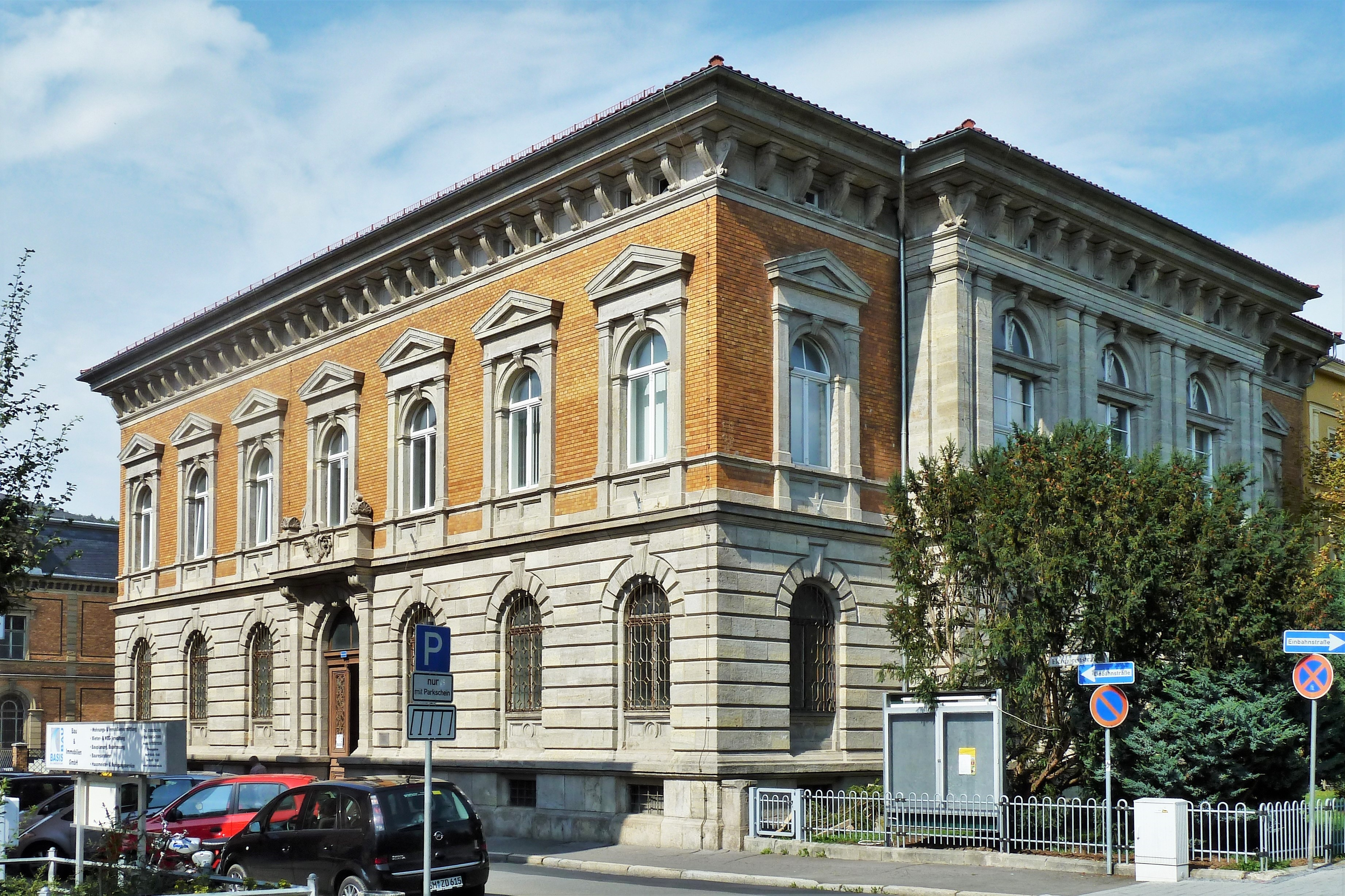 Ehemaliges Landtagsgebäude von Sachsen-Meiningen in der einstigen Landeshauptstadt Meiningen, zeitweise Nutzung als Fernmeldeamt, heute Bürogebäude.